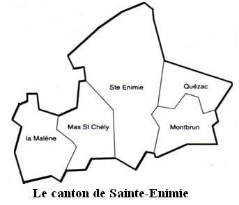 Le canton de sainte-Enimie Image personnelle